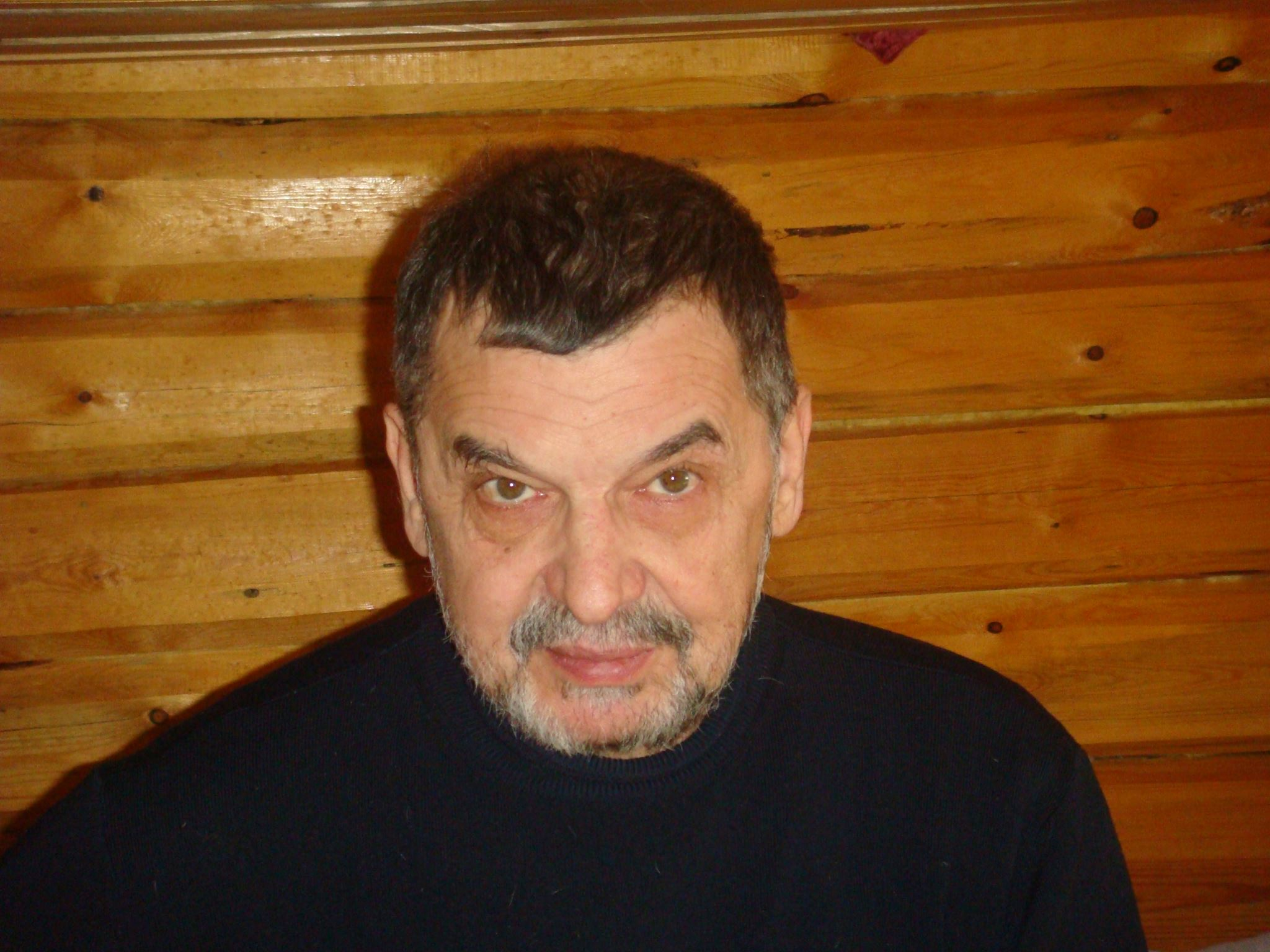 Театральный режиссер и педагог Вячеслав Всеволодович Кокорин.